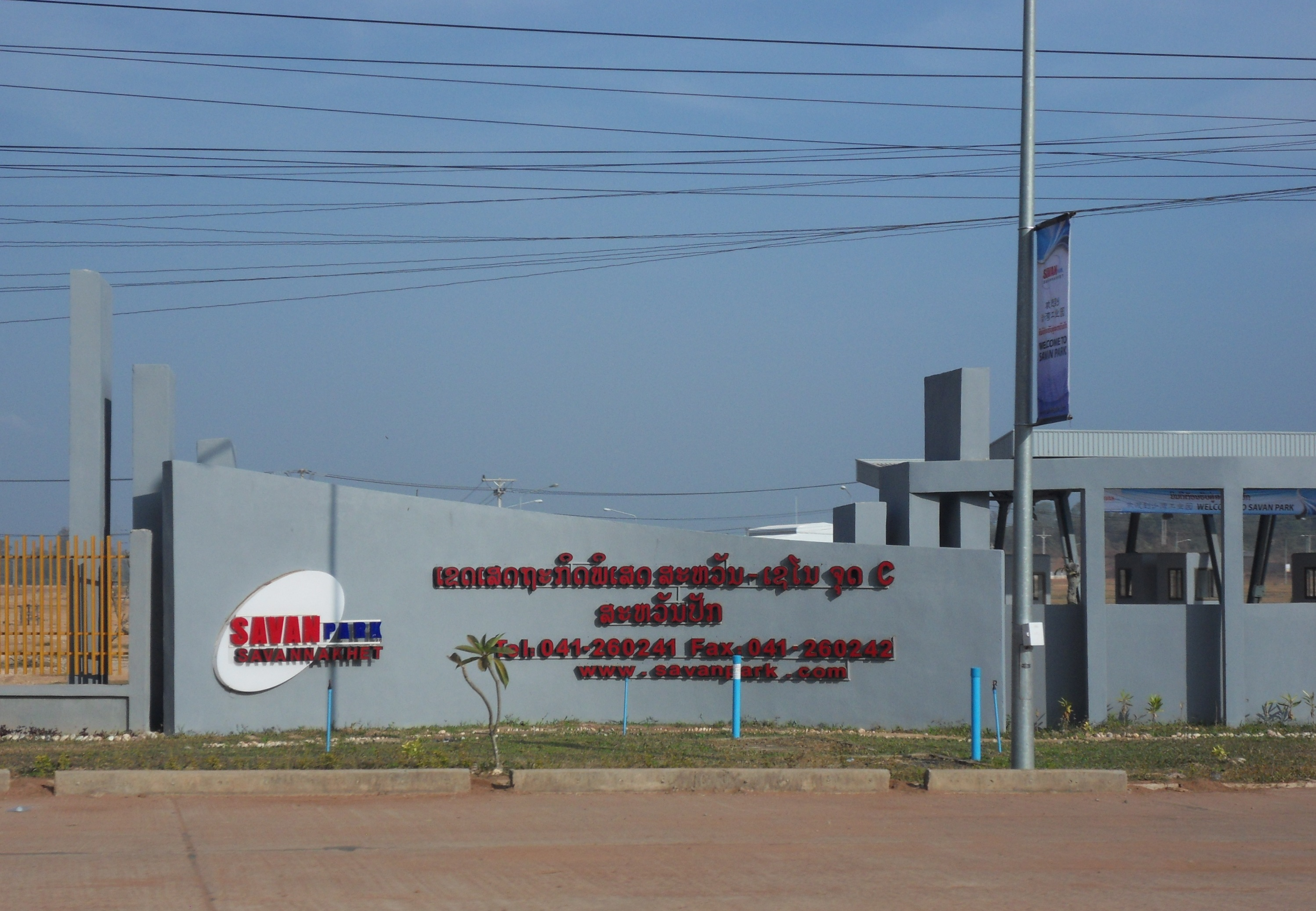 Entrée de la zone économique SavanPark, près de Savannaket (Laos).